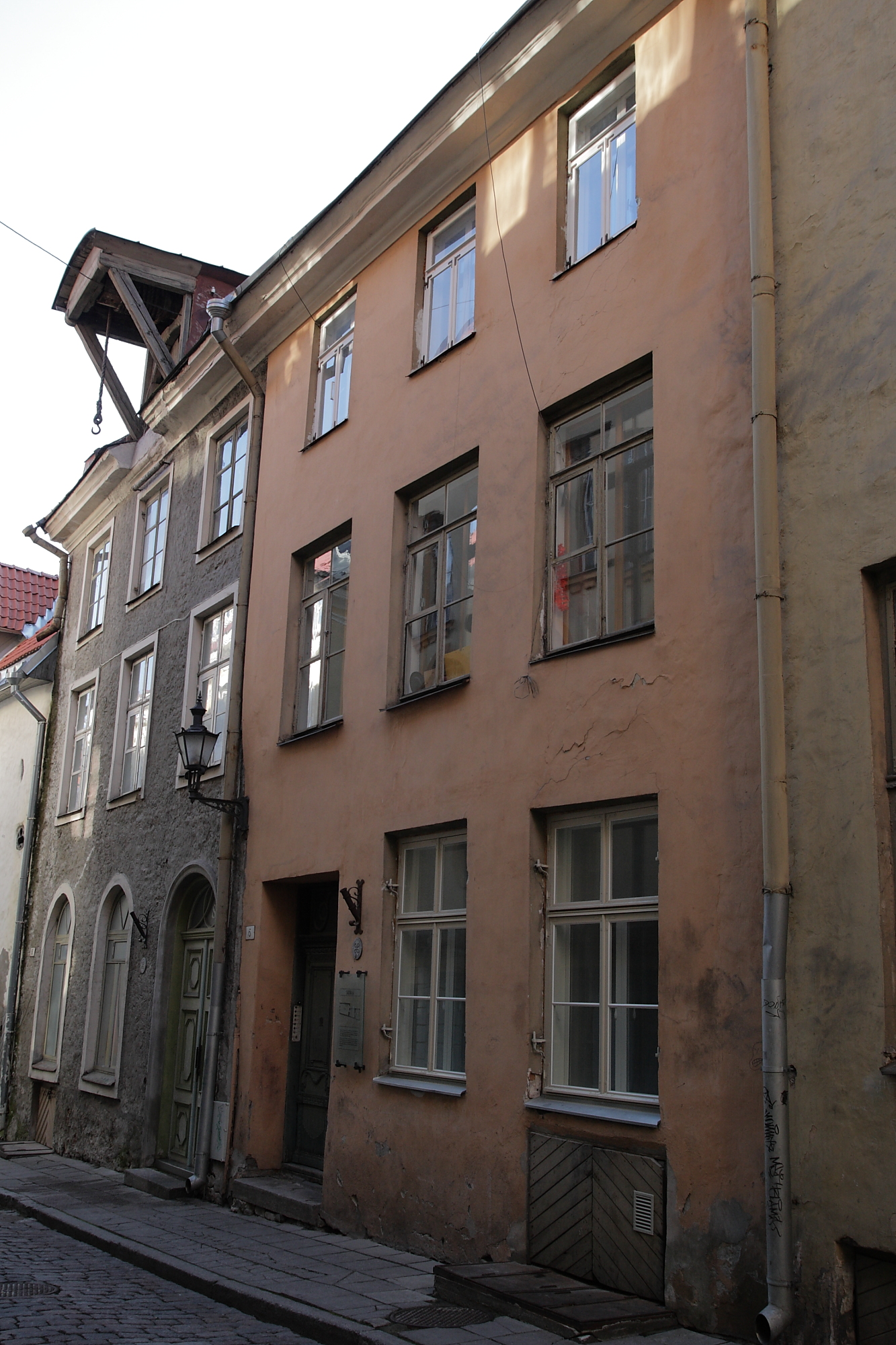 Tallinn, elamu Sauna 6